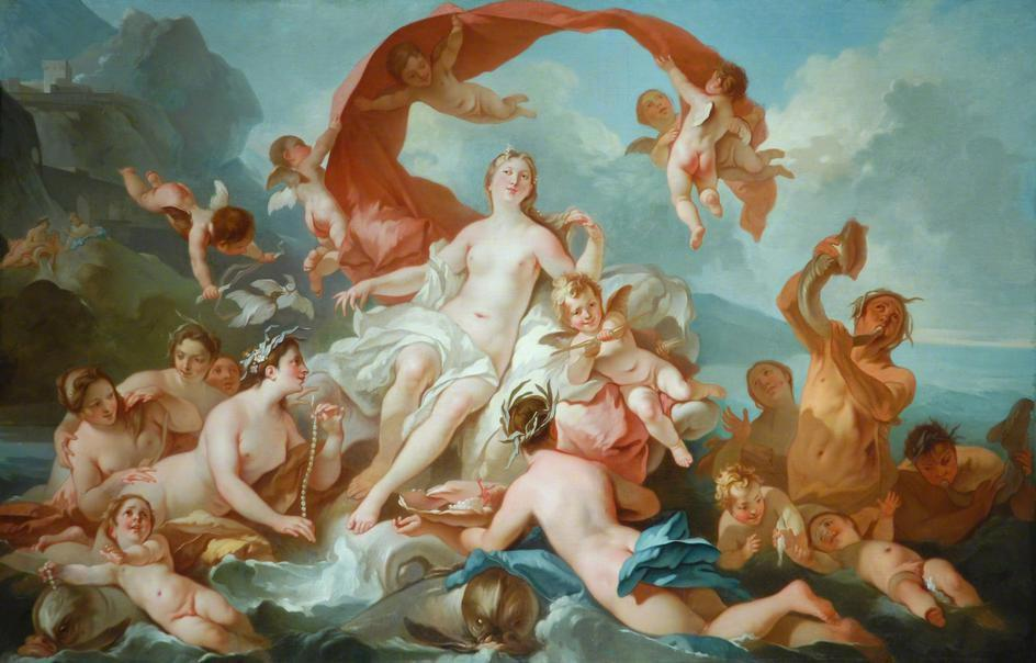 "La naissance de Vénus" — Pierre-Jacques Cazes.